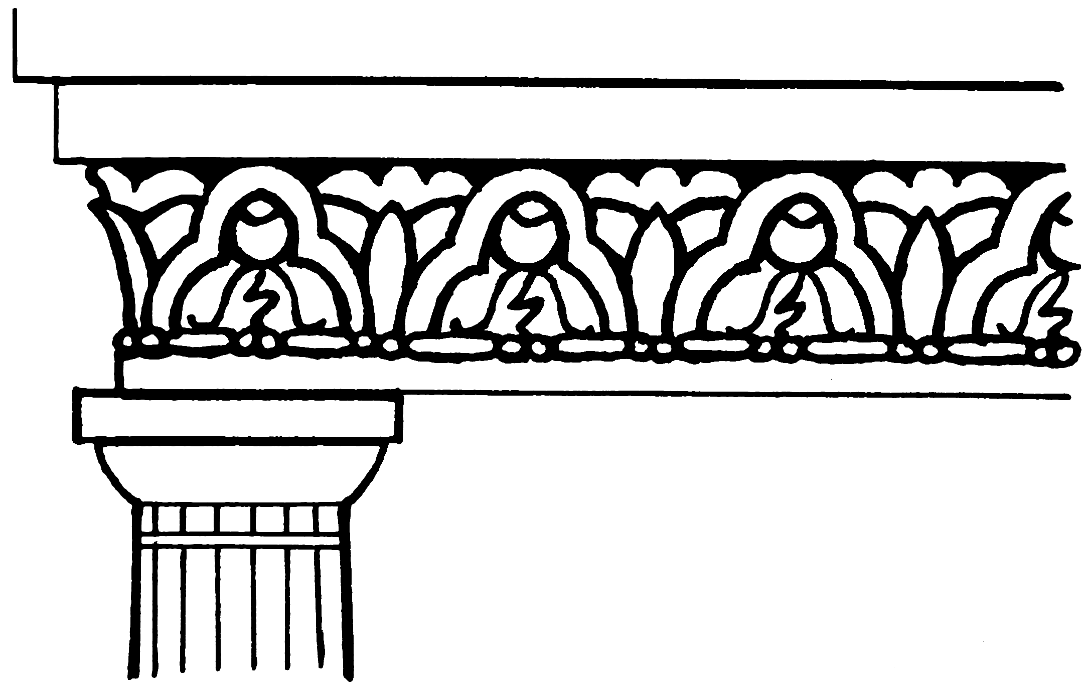 Frieze. ATTENZIONE ! Questo è un fregio di fantasia che non esiste nella realtà ! PAY ATTENTION ! This is a fantasy frieze that doesn't exist in ancient Greek architecture ! --DenghiùComm (talk) 19:04, 23 April 2015 (UTC)